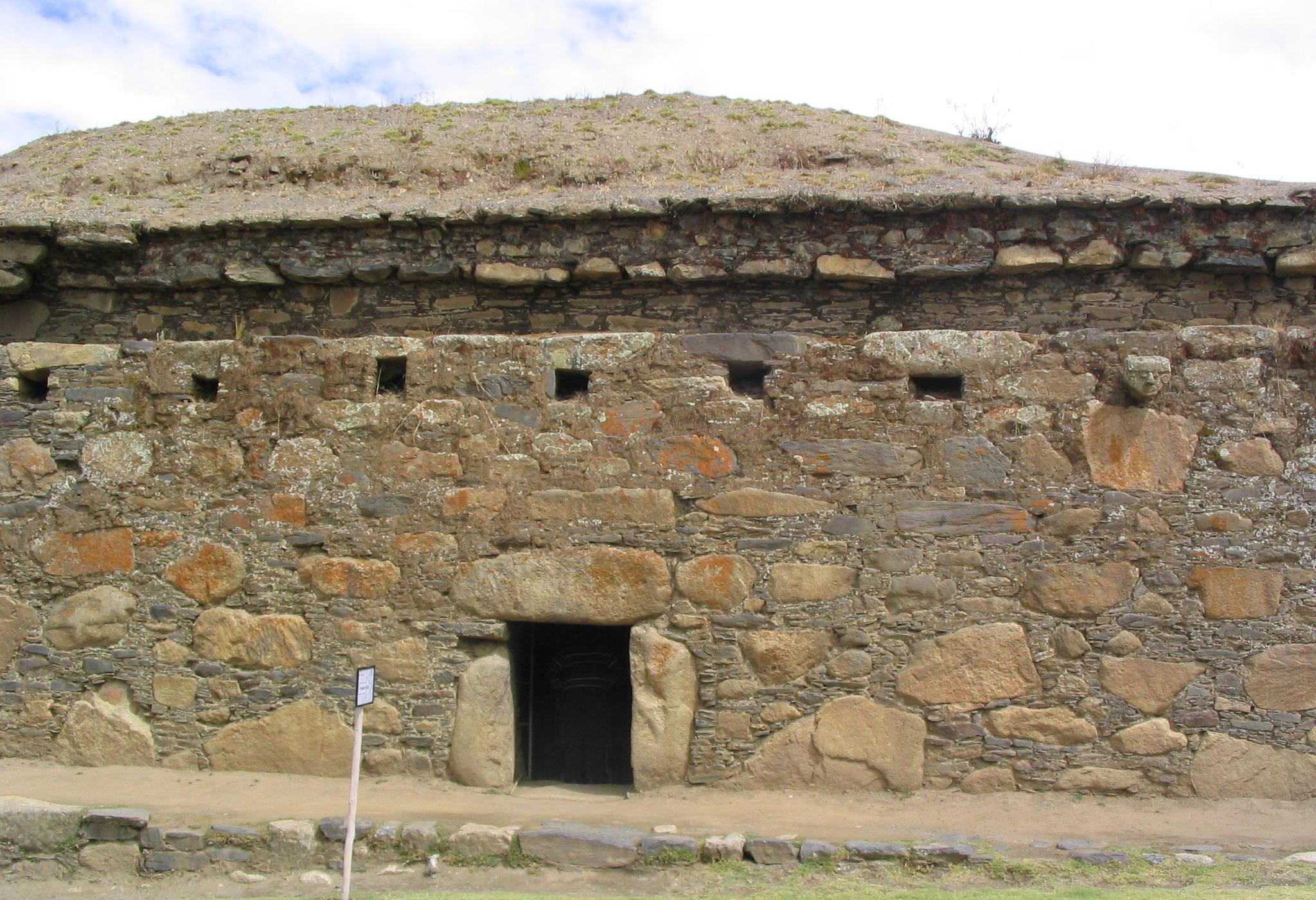 Willkawain, Temple in Peru, Ancash